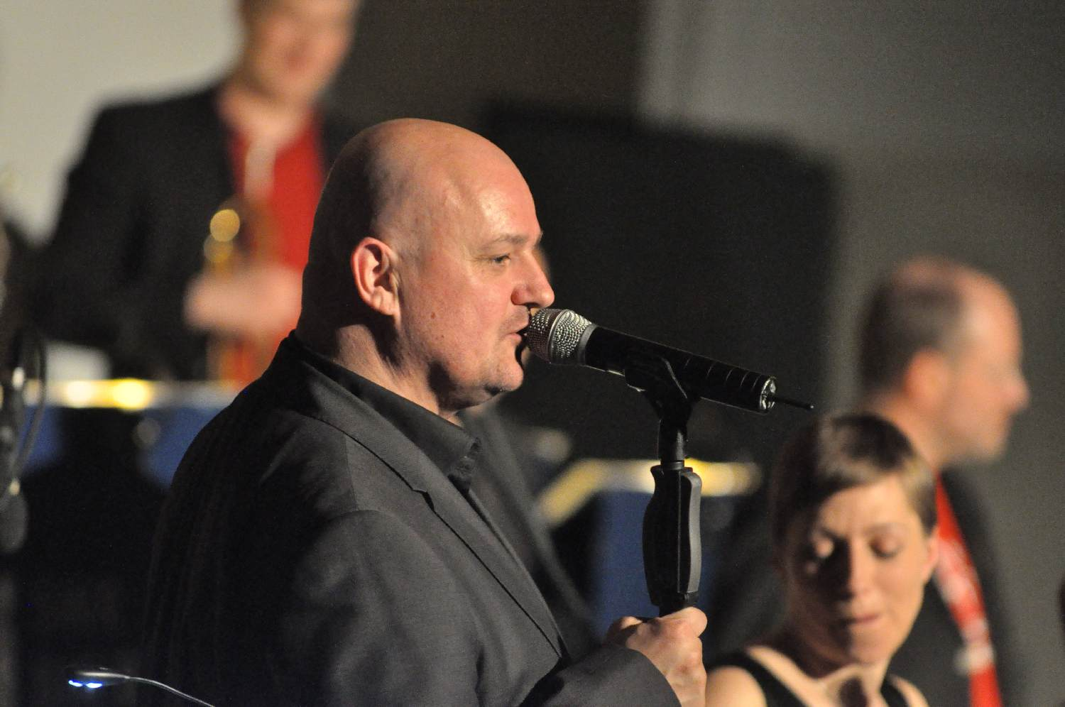 Ehemaliger Sänger der Söhne Mannheims, Rolf Stahlhofen bei einem Auftritt 2010 in Bopfingen.